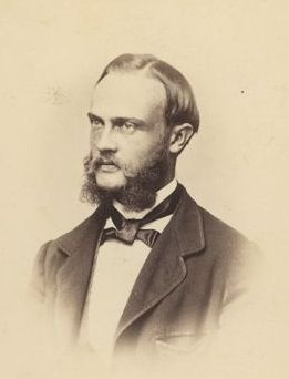 Wilhelm Krahe (1839 – 1921), Brustbild, nach rechts blickend, deutscher Architekt und braunschweigischer Baubeamter. Leiter der Hochbauinspektion Braunschweig (1877 - 1907)